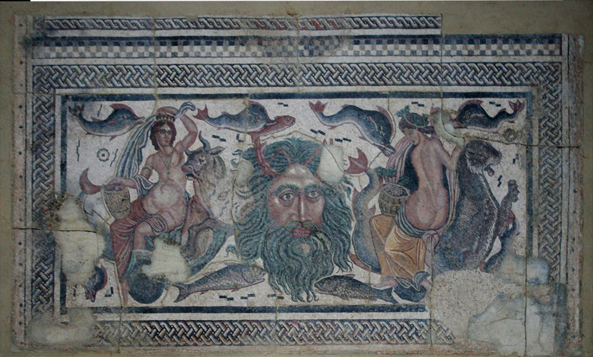 Mosaico encontrado en el yacimiento de época romana de la denominada Villa Possidica, en Dueñas (Palencia) actualmente en el Museo de Palencia